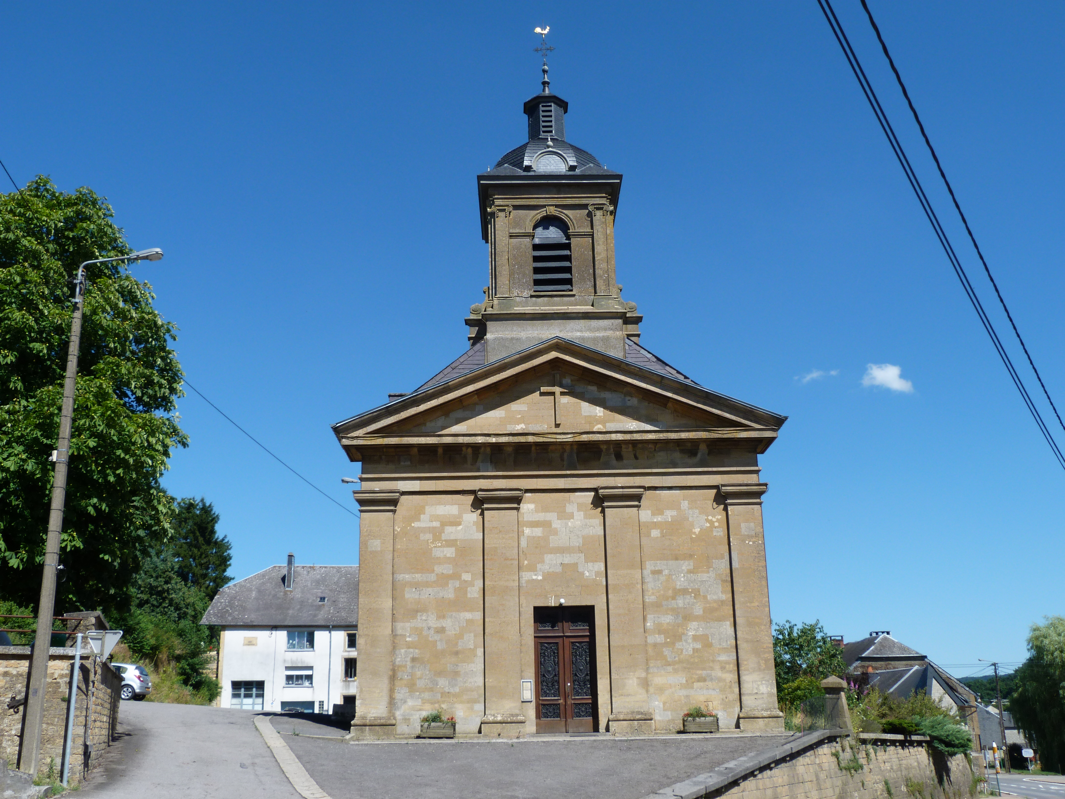 L'église de Signeulx, de face, en août 2013